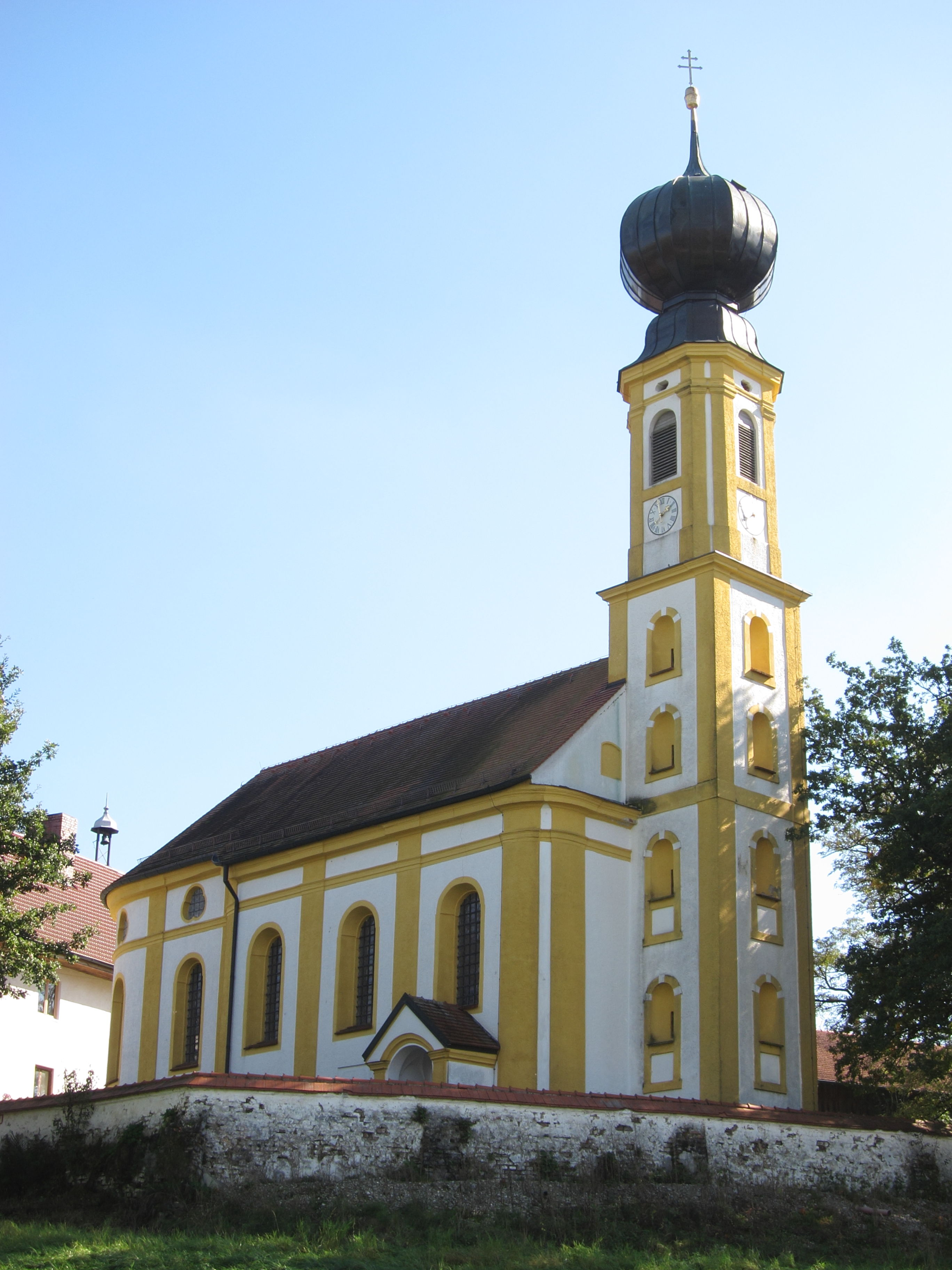 Oppolding; kath. Filialkirche St. Johannes d.T., Saalbau mit Zwiebelturm, in barockem Stil von Johann Baptist Lethner errichtet, 1764; mit Ausstattung.